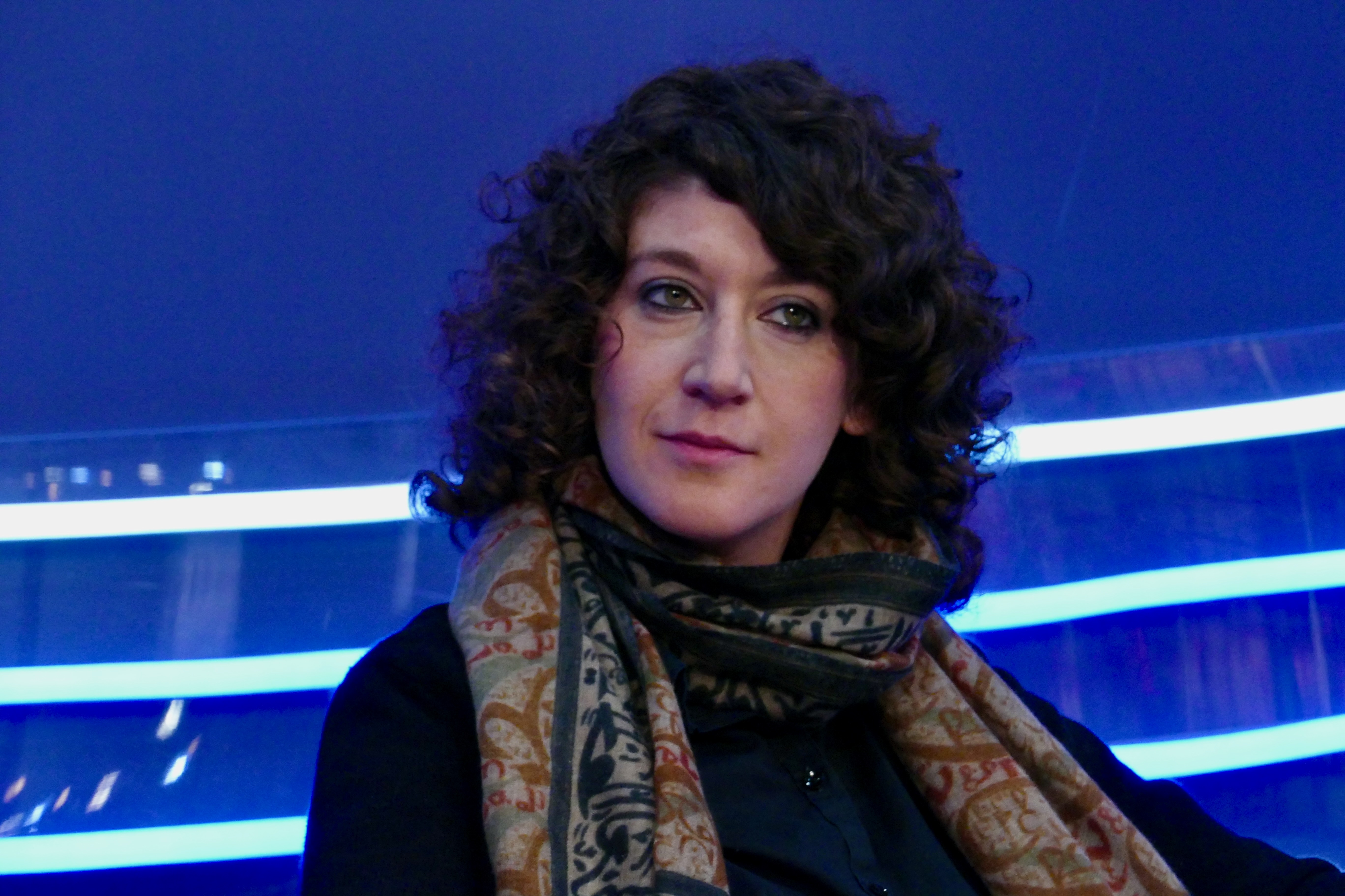 Lena Gorelik spricht auf der Leipziger Buchmesse über ihren Roman "Mehr Schwarz als Lila"